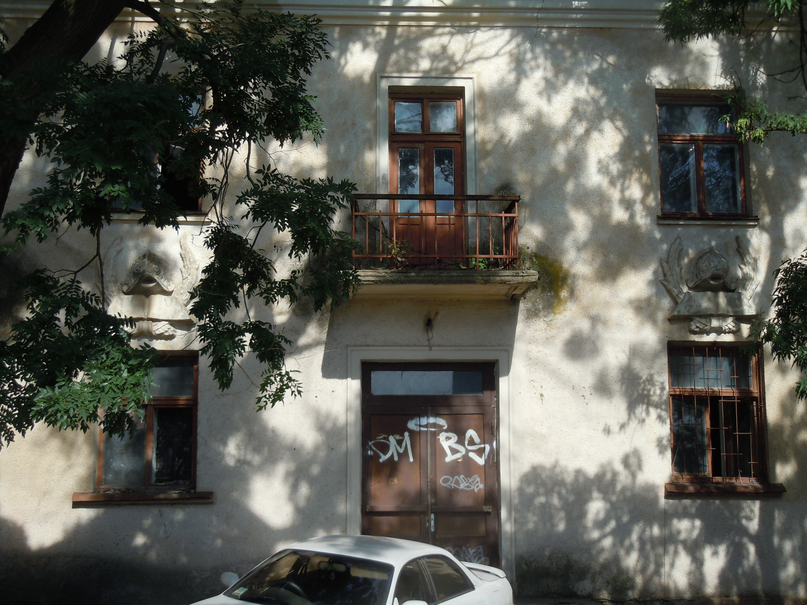 Старий будинк у Люстдорфі